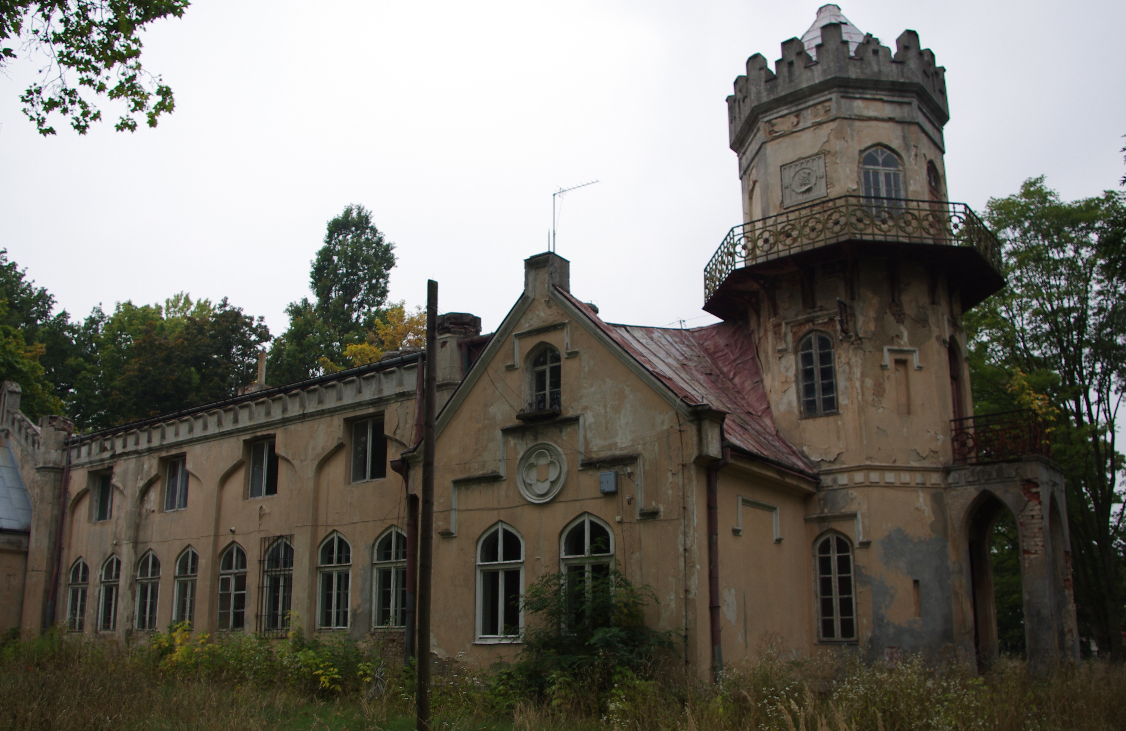 Wieniec, oficyna-oranżeria, tzw. Stary Dwór